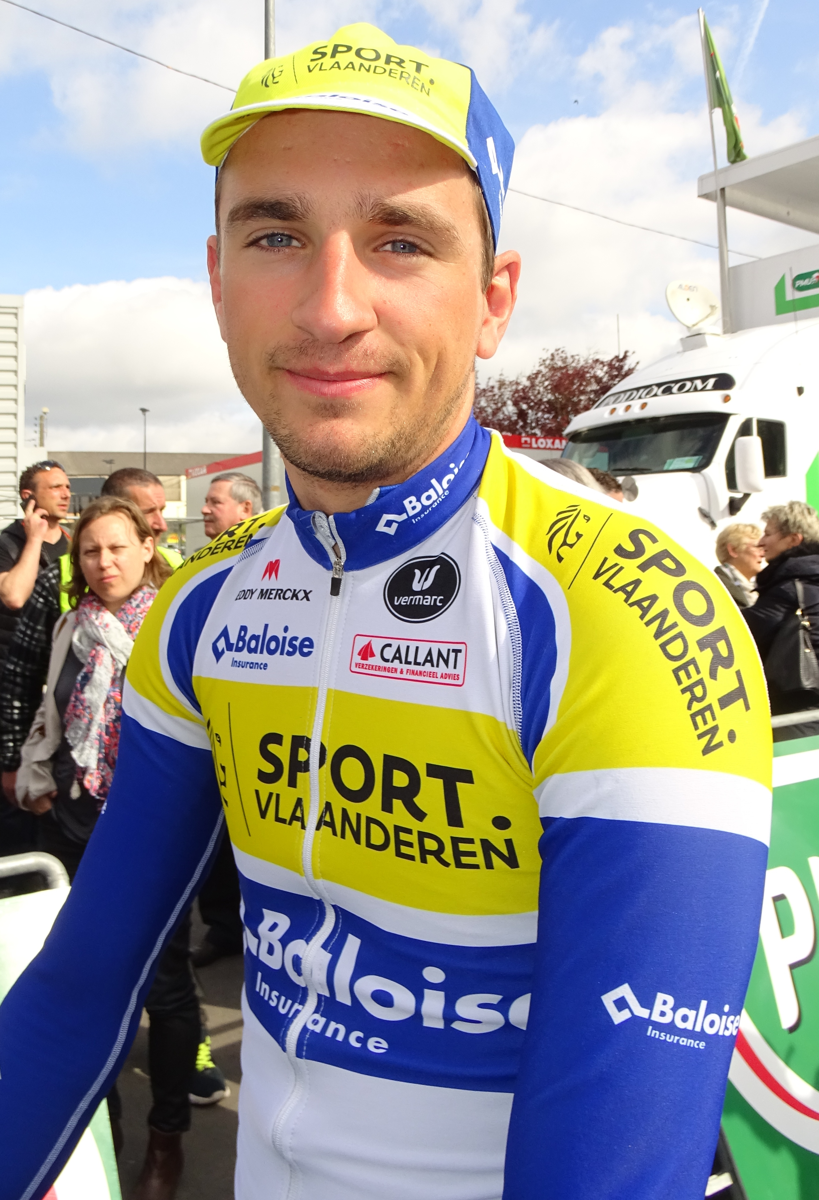 Reportage réalisé le jeudi 13 avril à l'occasion du départ et de l'arrivée du Grand Prix de Denain 2017 à Denain, Nord, Nord-Pas-de-Calais-Picardie, France.